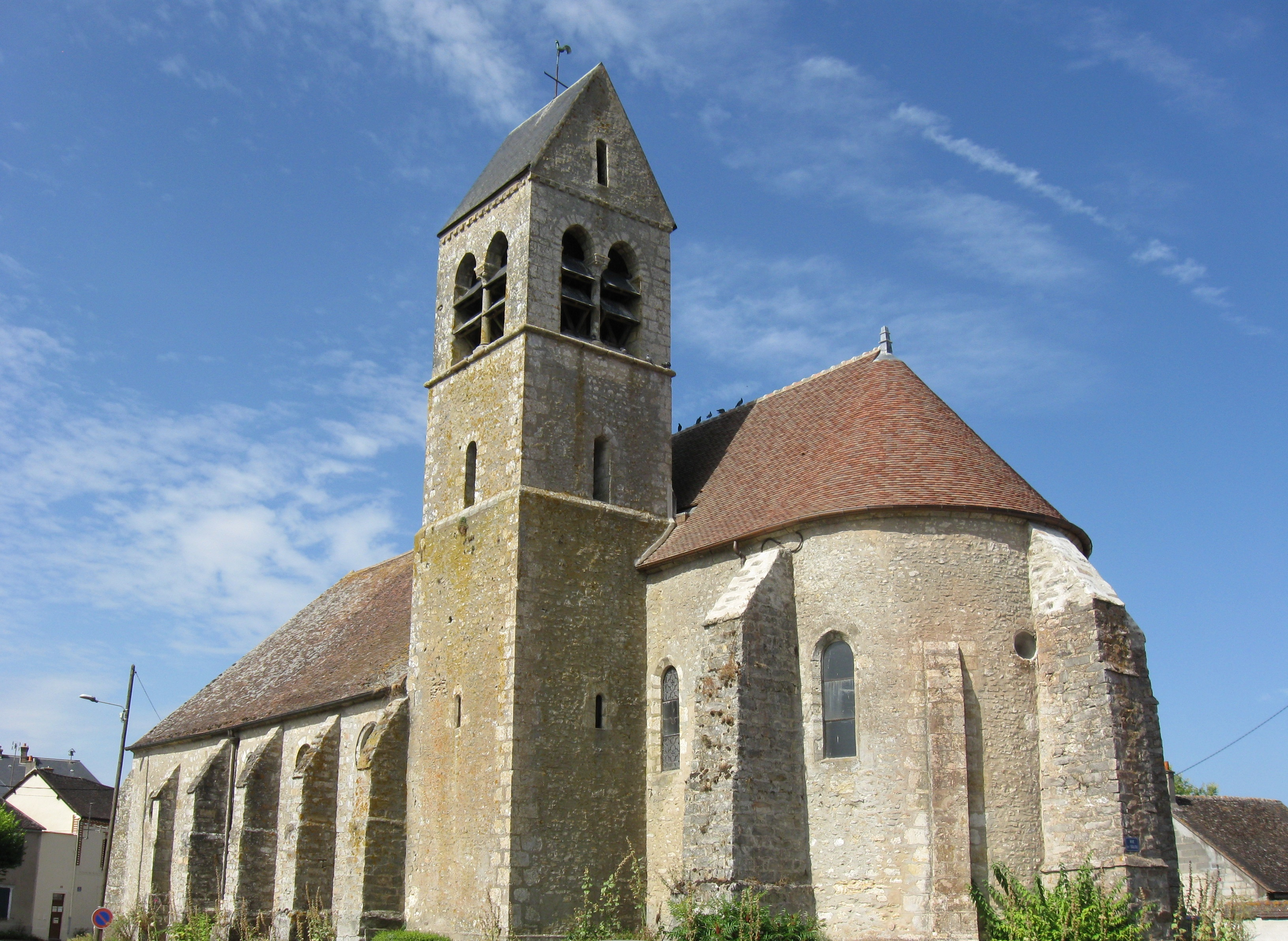 Église Saint-Martin d'Aufferville. (Seine-et-Marne, région Île-de-France).